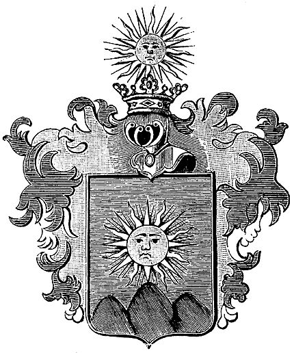 Blason de la famille hongroise Szontagh de Igló et Zabar (iglói és zabari Szontagh" en hongrois) "